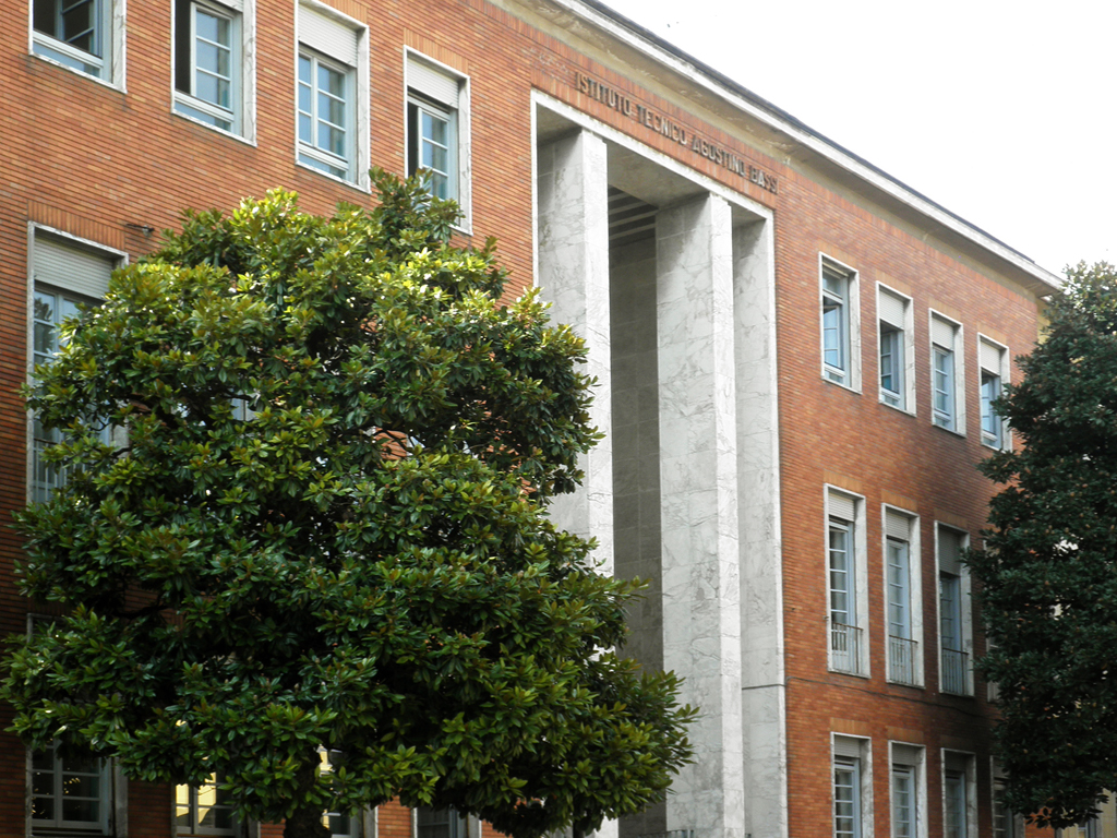 Istituto Tecnico Bassi a Lodi